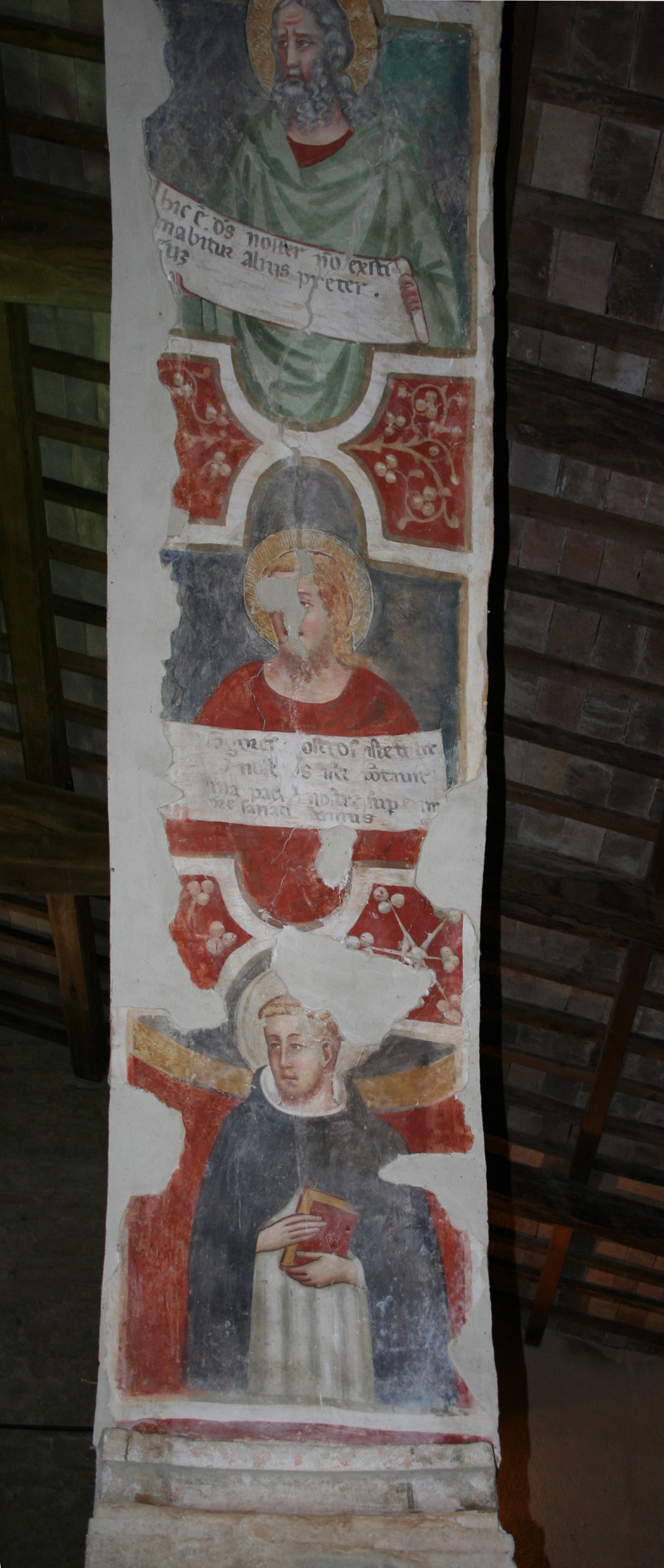 Chiesa di San Salvatore di Canzano, affreschi del primo arco a sinistra, interno dell'edificio religioso appartenente al complesso abbaziale omonimo nel paese di Canzano in provincia di Teramo, Abruzzo, Italia. Un sentito ringraziamento alla Dott.ssa Katia Pompetti, Assessore alla Cultura per il Comune di Canzano, che accordandomi il permesso d’ingresso, ha consentito lo scatto di questa immagine.